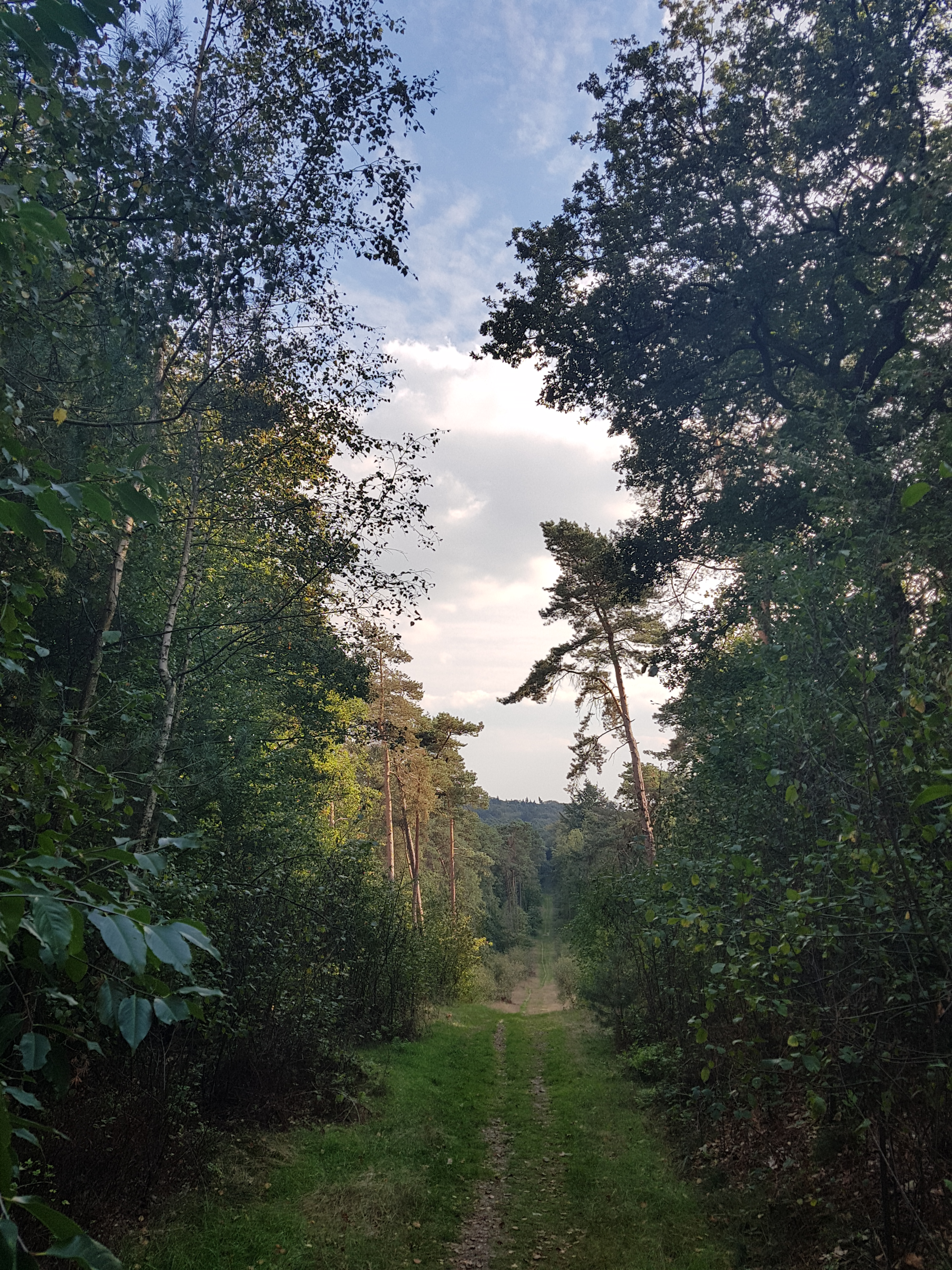 voormalige skihelling Darthuizerberg